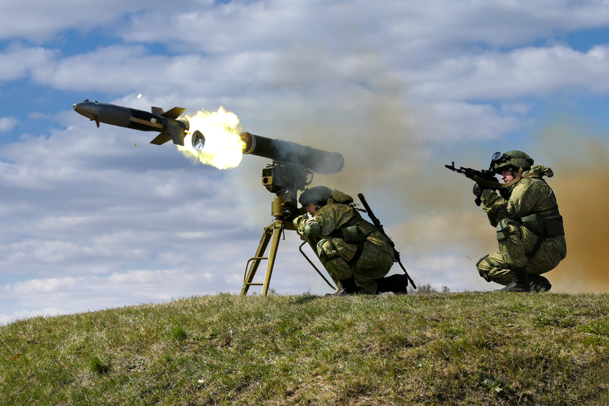 Контрольная проверка курсантов Учебного центра боевого применения ракетных войск и артиллерии Сухопутных войск Западного военного округа (Московская обл.)